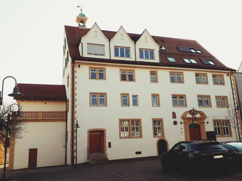 Schloss Aldingen, auch Neues Schloss oder Äußeres Schloss genannt, 1580 erbautes durch Heinrich von Katlental beauftragtes Herrenhaus im Stil der Renaissance in Remseck-Aldingen